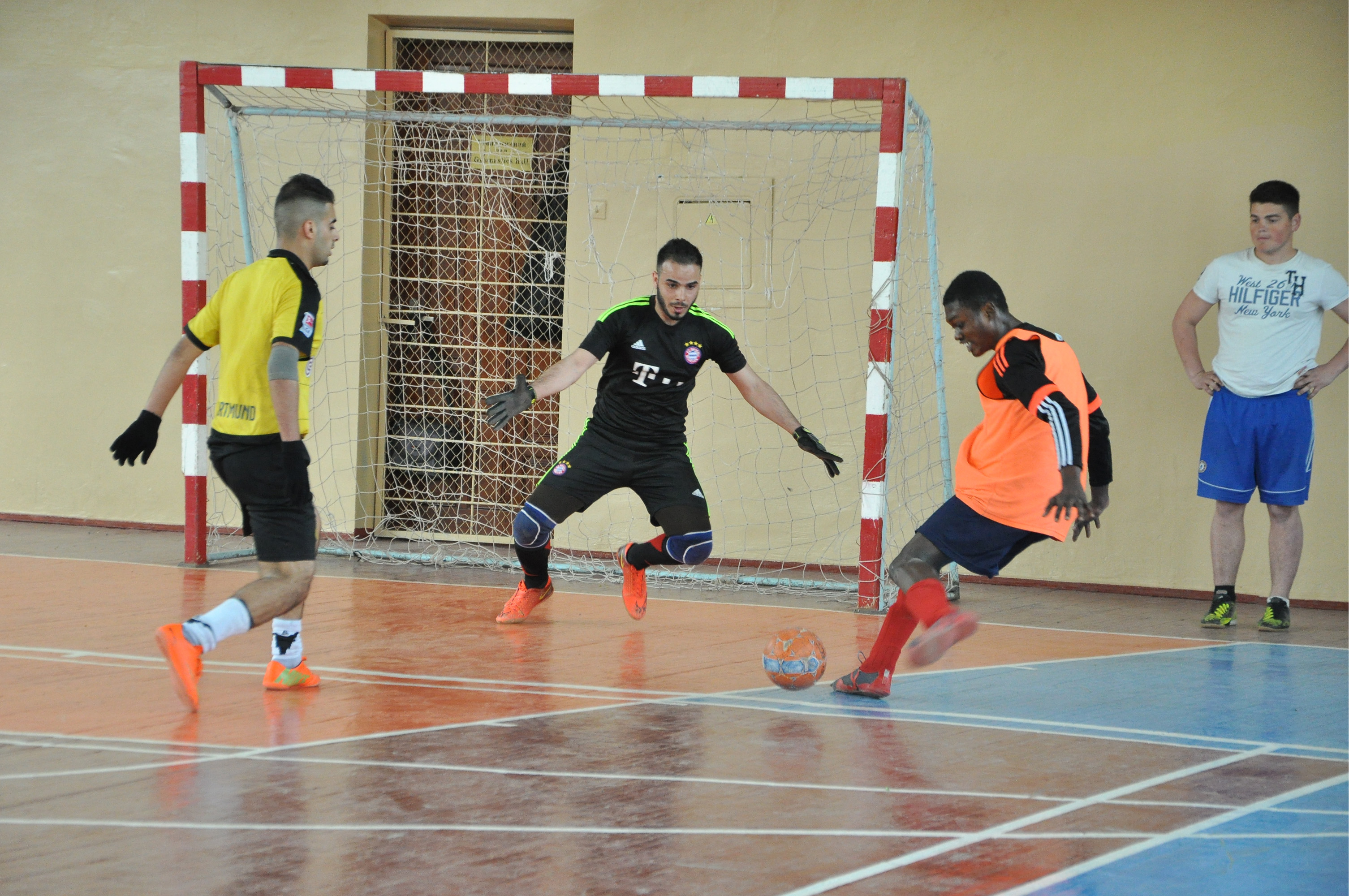 Міні-футбол «Ліга чемпіонів» Тернопільського державного медичного університету імені І. Я. Горбачевського. Півфінальні та фінальний поєдинки 26 квітня 2016 року. Поєдинок між командами Гани та Іраку.